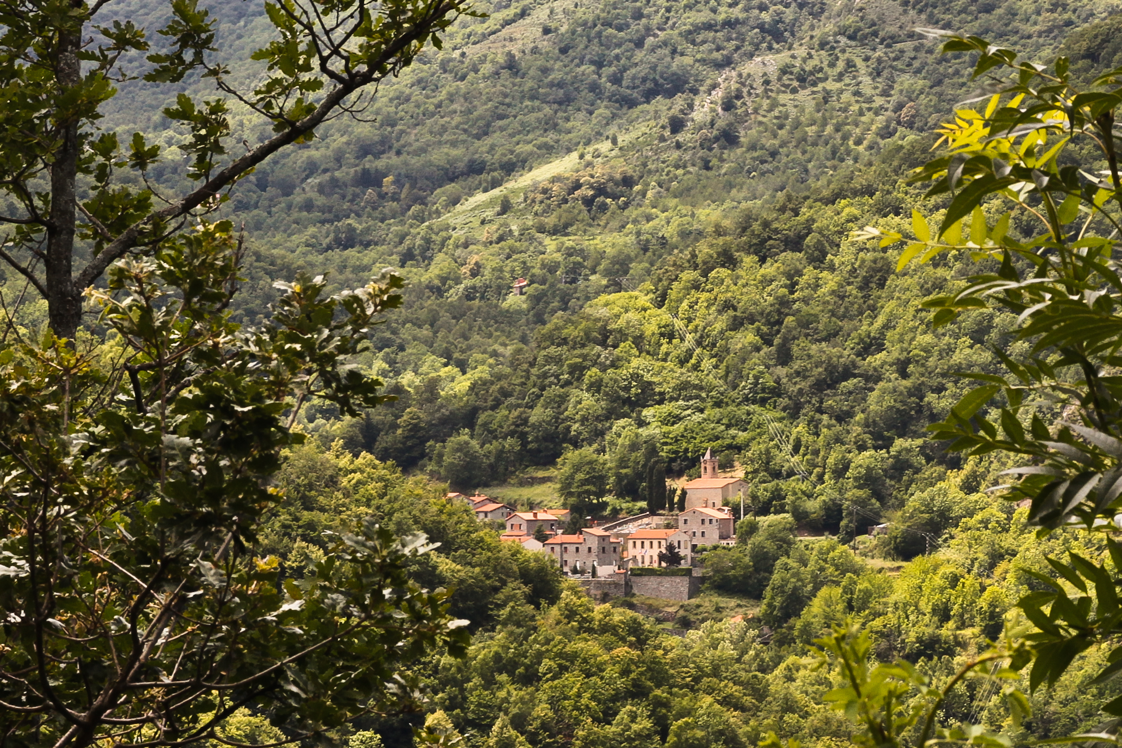 Village de Valmanya